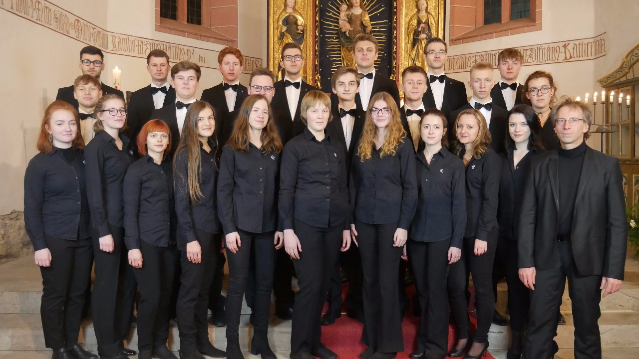 Das collegium_rutheneum [1608] in Wünschendorf 2017